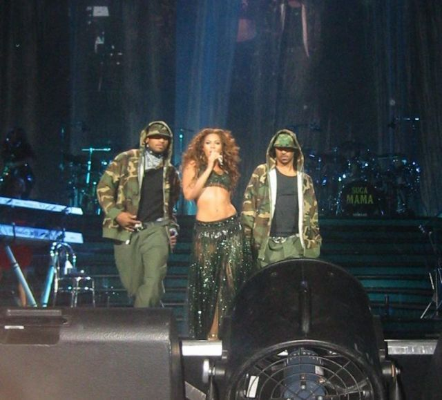 Beyoncé Knowles singing "Baby Boy"